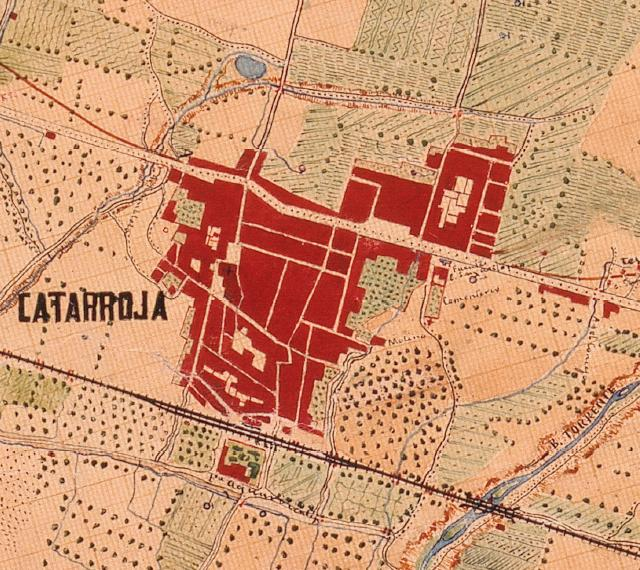 Catarroja el 1883 (el nord està a la dreta).